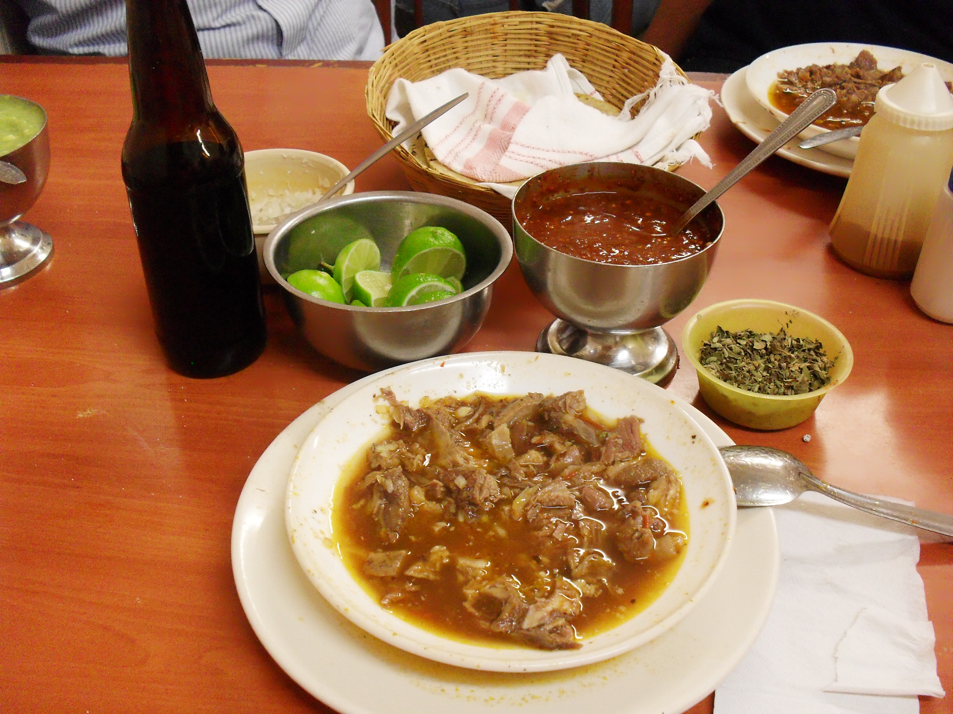 Plato de birria con todos lo que lleva como salsa, orégano, limón y tortillas a mano